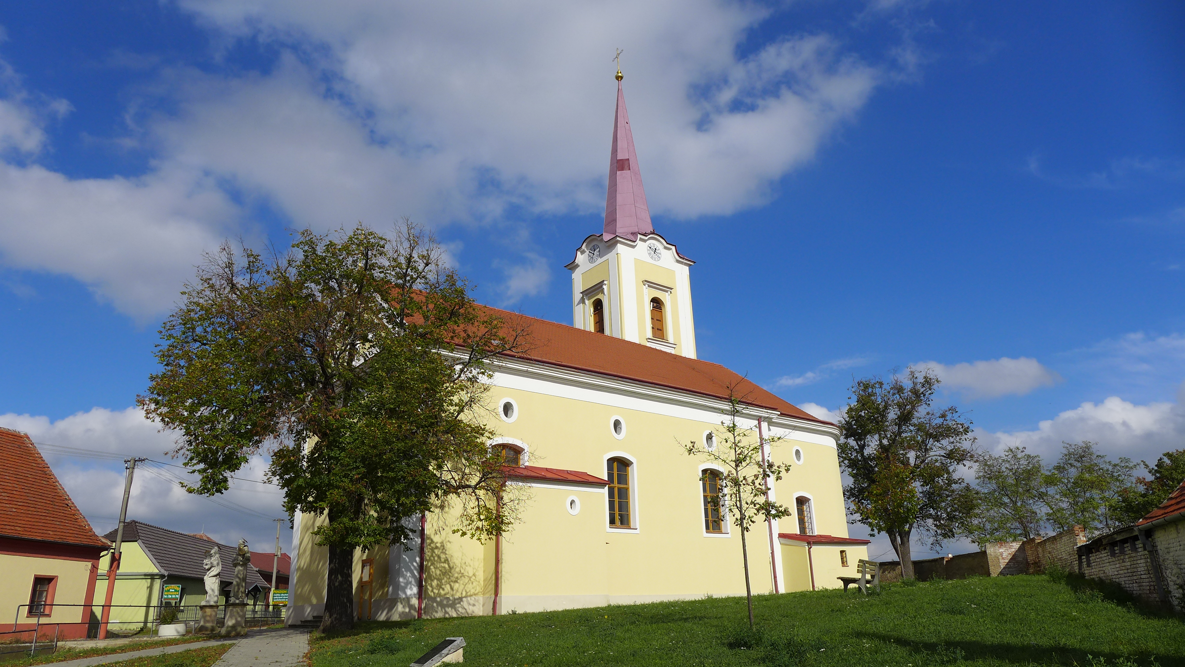 Kostel svatého Jiří, Litobratřice.